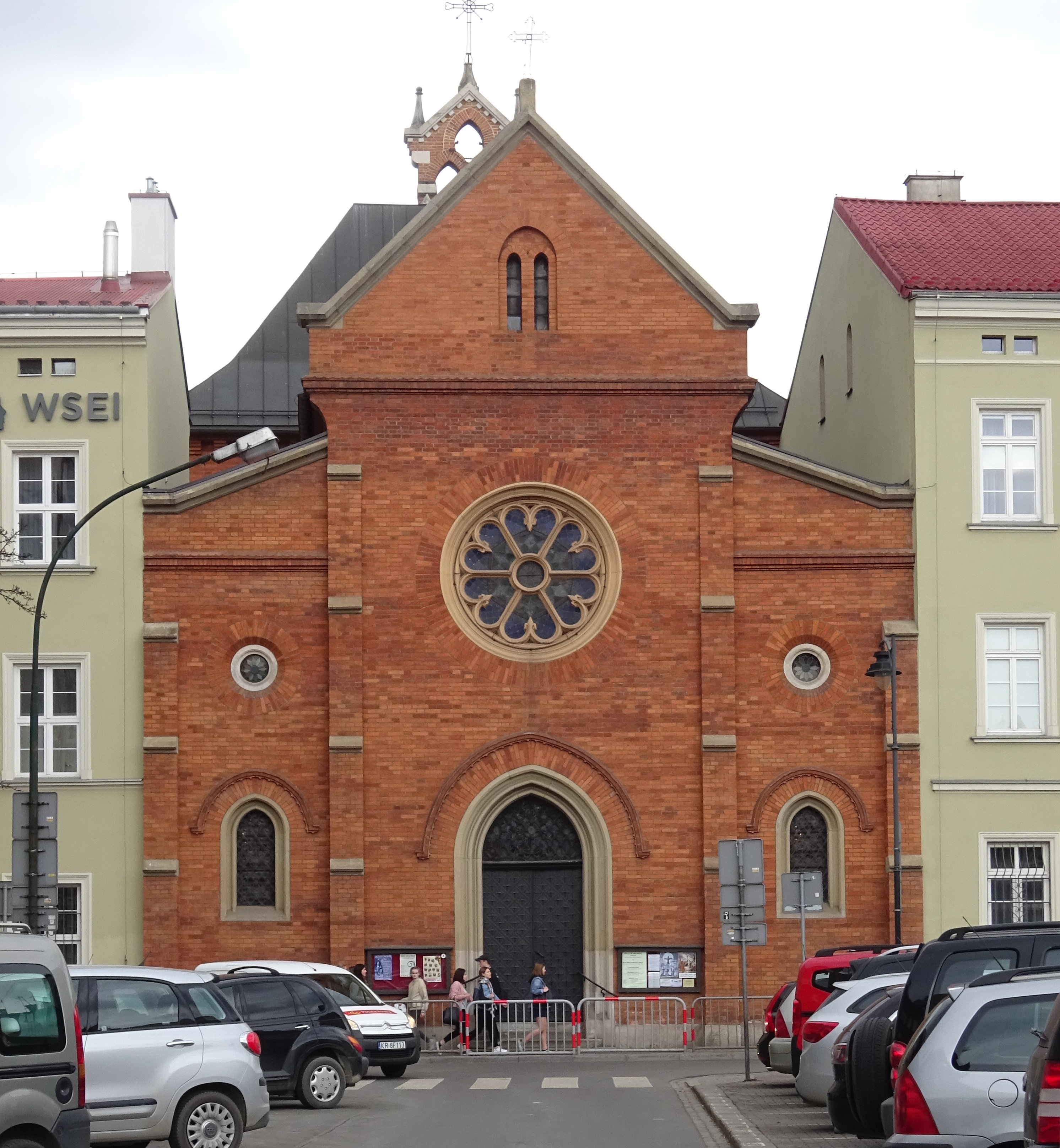 Kościół św. Wincentego à Paulo w Krakowie przy Rynku Kleparskim. Fasada, widok z południa. 2018